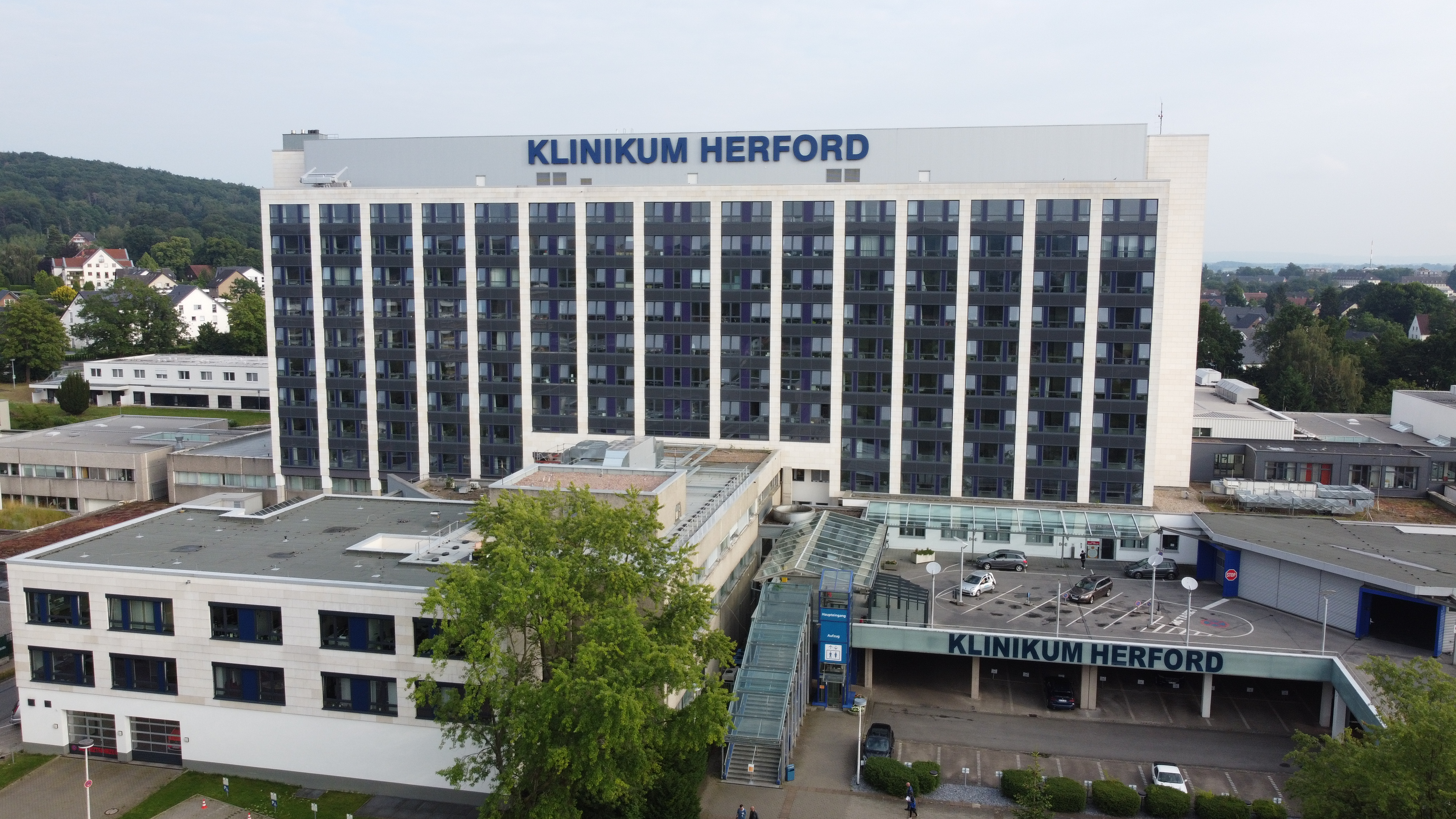 Klinikum Herford Luftbild mit Drohne